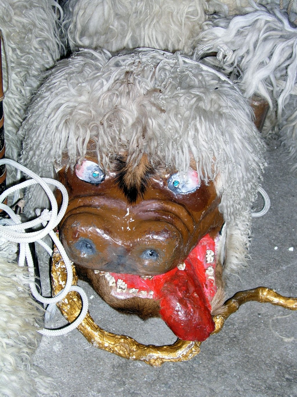 Halubajski zvončari, Viškovo, Hrvatska